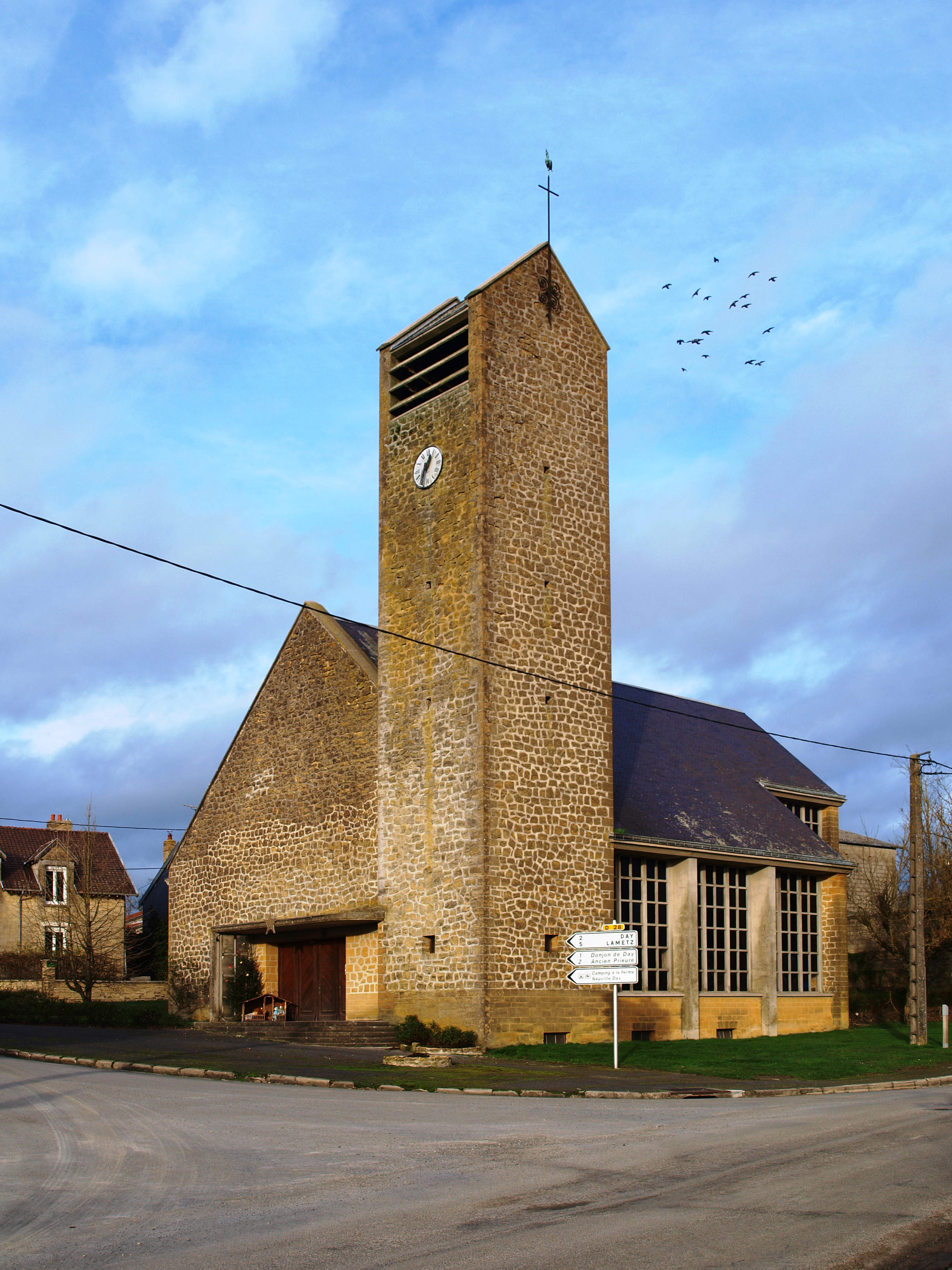 Neuville-Day (Ardennes, France) ; l'église de Neuville.